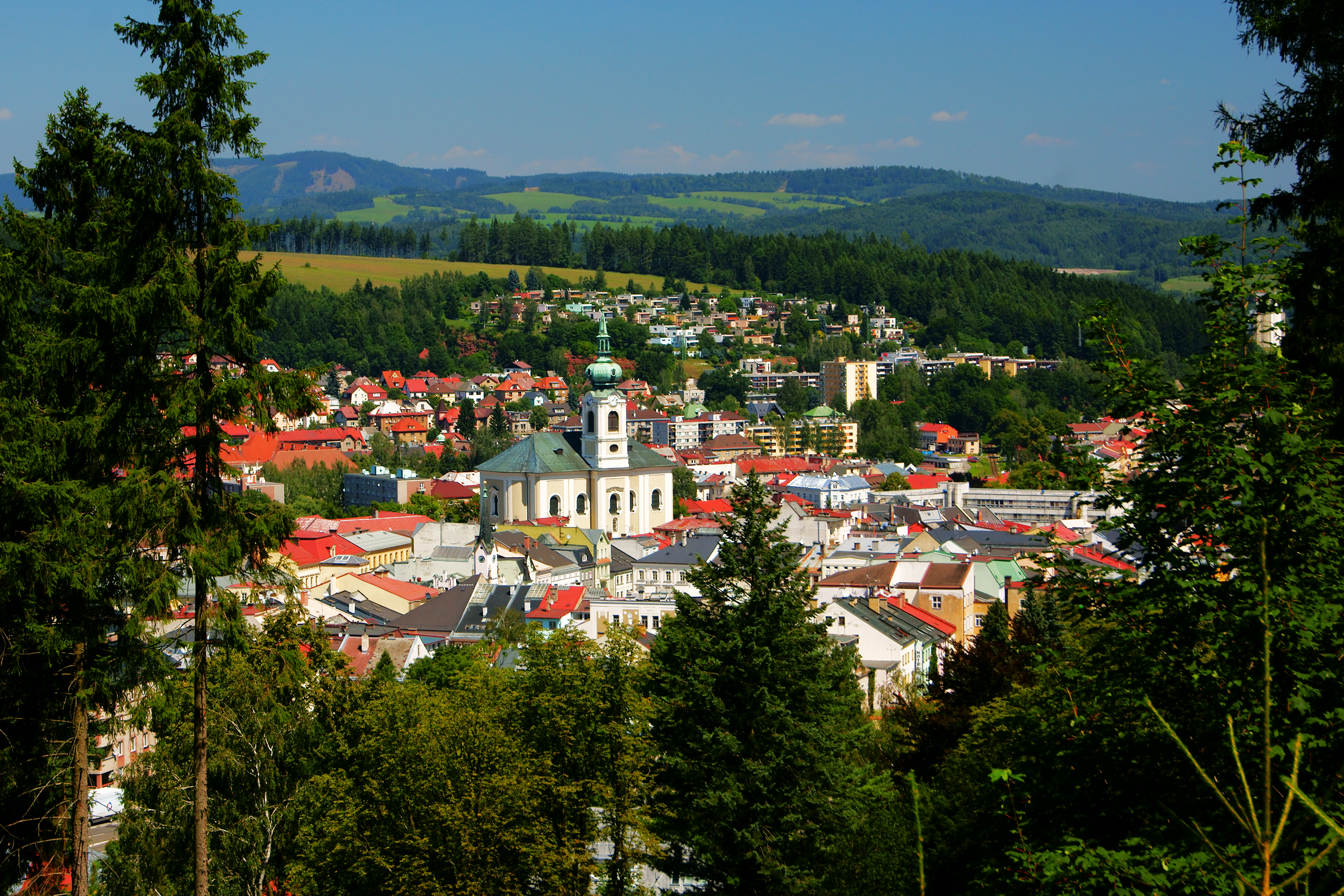 Centrum města, barokní kostel Narození Panny Marie.